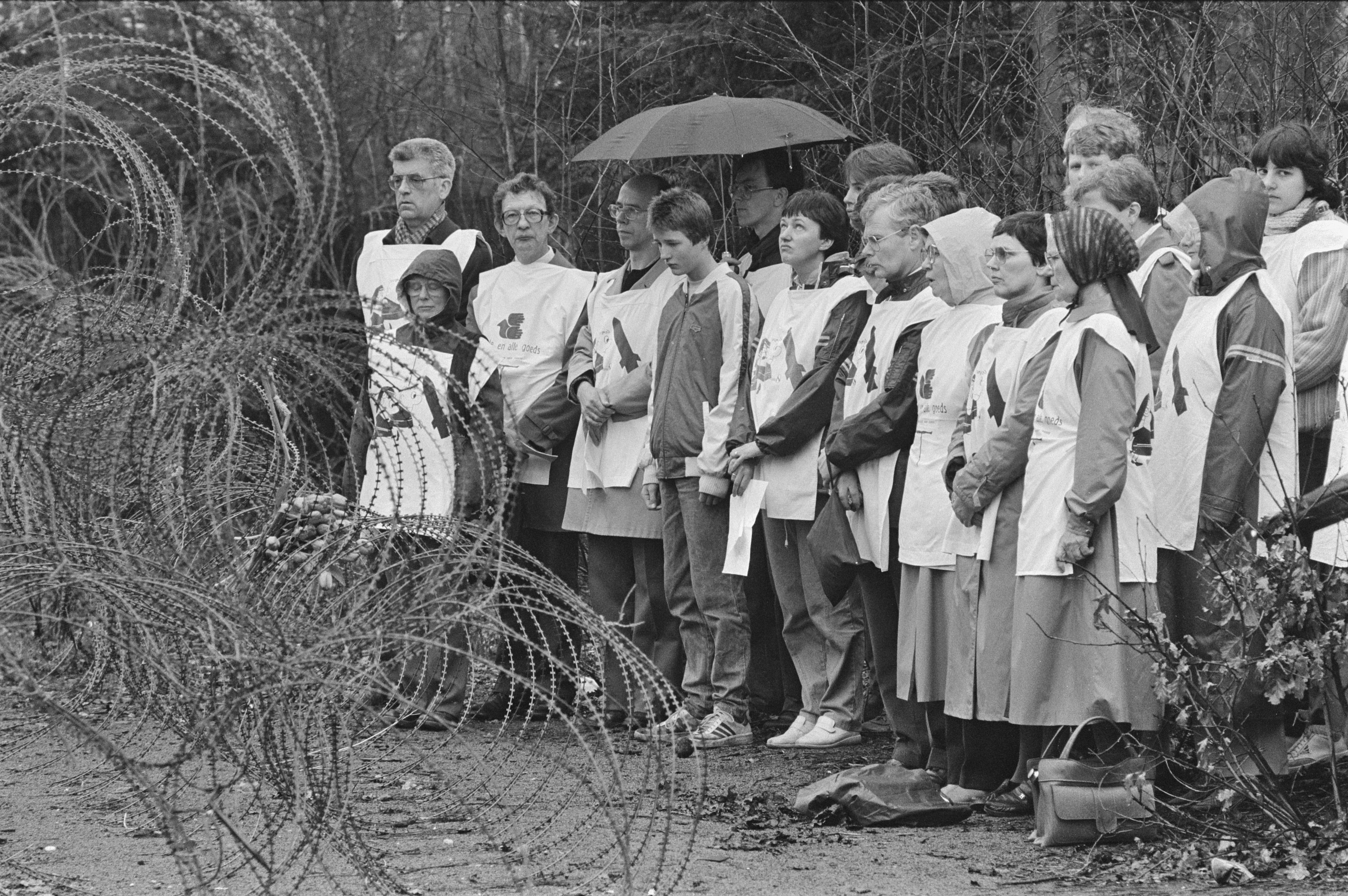 Collectie / Archief : Fotocollectie Anefo Reportage / Serie : [ onbekend ] Beschrijving : Franciscaanse Vredeswacht houdt bij de vliegbasis Woensdrecht een extra wake; Franciscanen bij de basis Datum : 5 april 1985 Locatie : Noord-Brabant, Woensdrecht Trefwoorden : VLIEGBASIS, wake Persoonsnaam : Franciscanen Fotograaf : Croes, Rob C. / Anefo Auteursrechthebbende : Nationaal Archief Materiaalsoort : Negatief (zwart/wit) Nummer archiefinventaris : bekijk toegang 2.24.01.05 Bestanddeelnummer : 933-2869